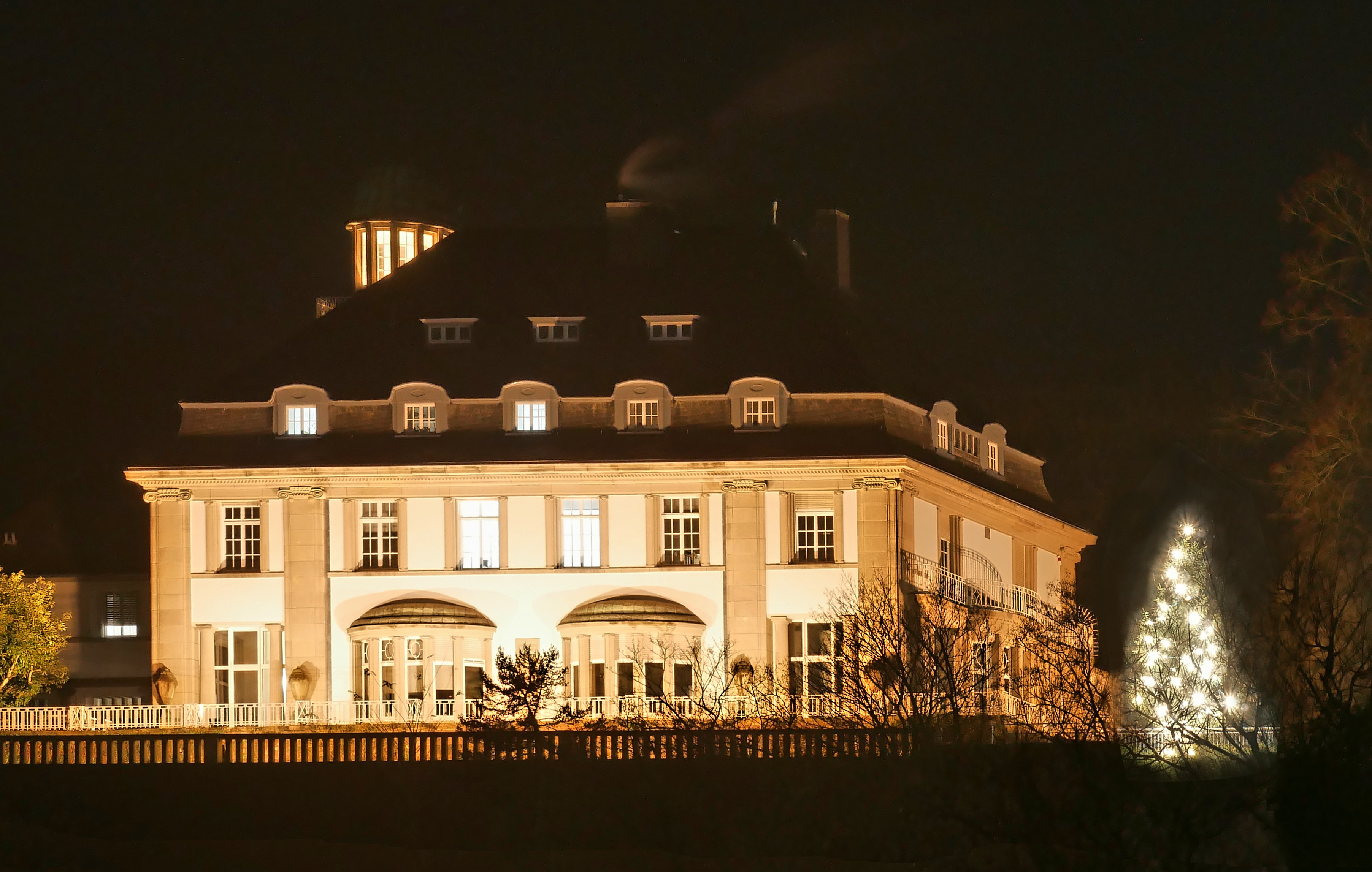 Trier (Germany) Viall Reverchon nachts mit Weihnachtsbaum